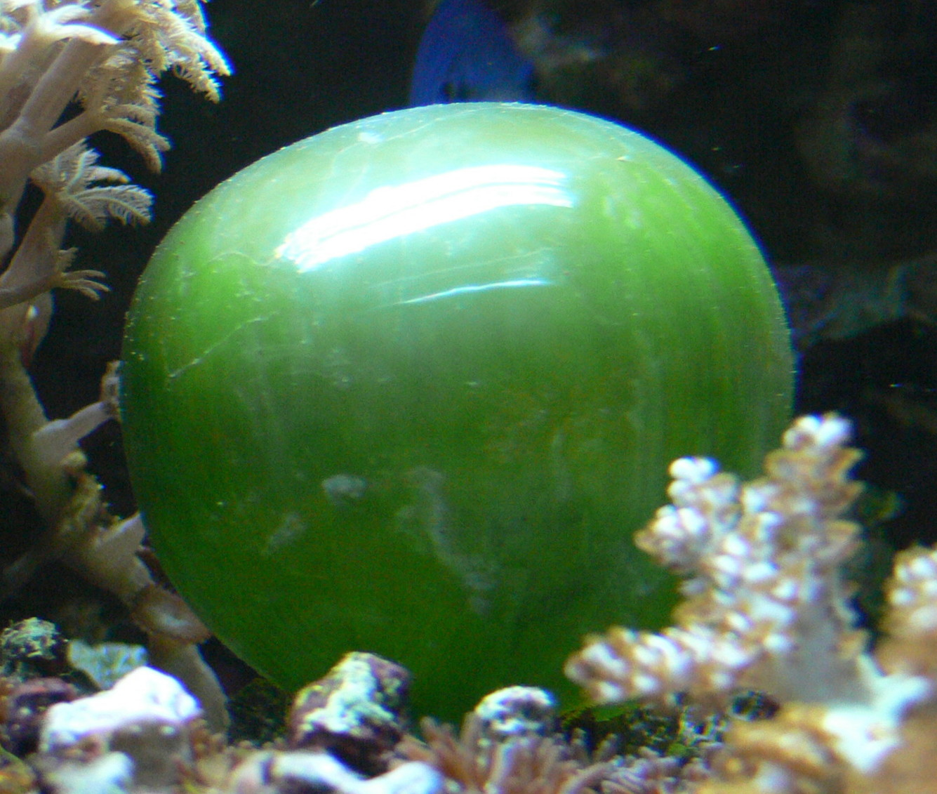 Blasenalge (Valonia ventricosa, Syn. Ventricaria ventricosa)